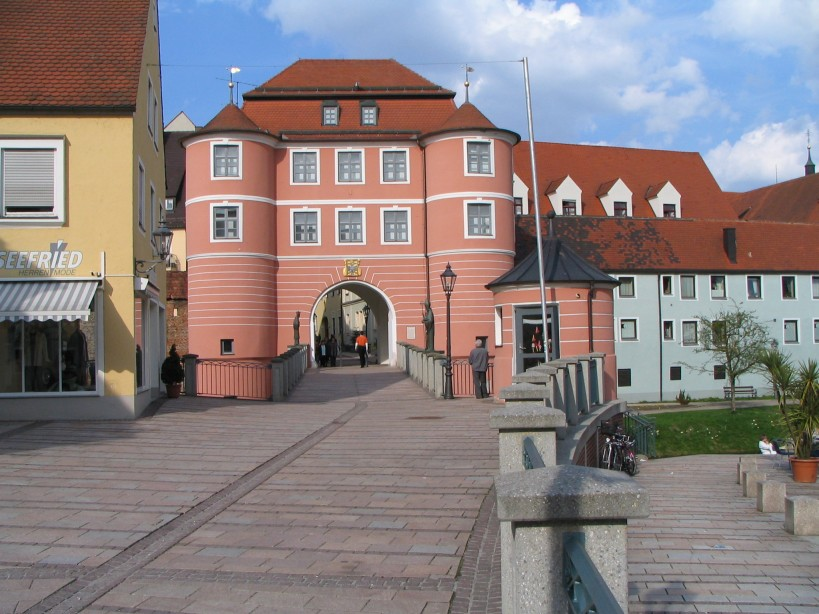 Riedertor Donauwörth